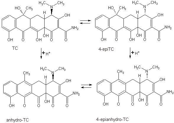 Tetracyklin degradace